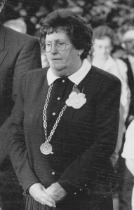 Renesse. Oude Moolweg. Kranslegging bij het oorlogsmonument; mevr. J.L. Niemantsverdriet-Leenheer, burgemeester van Westerschouwen